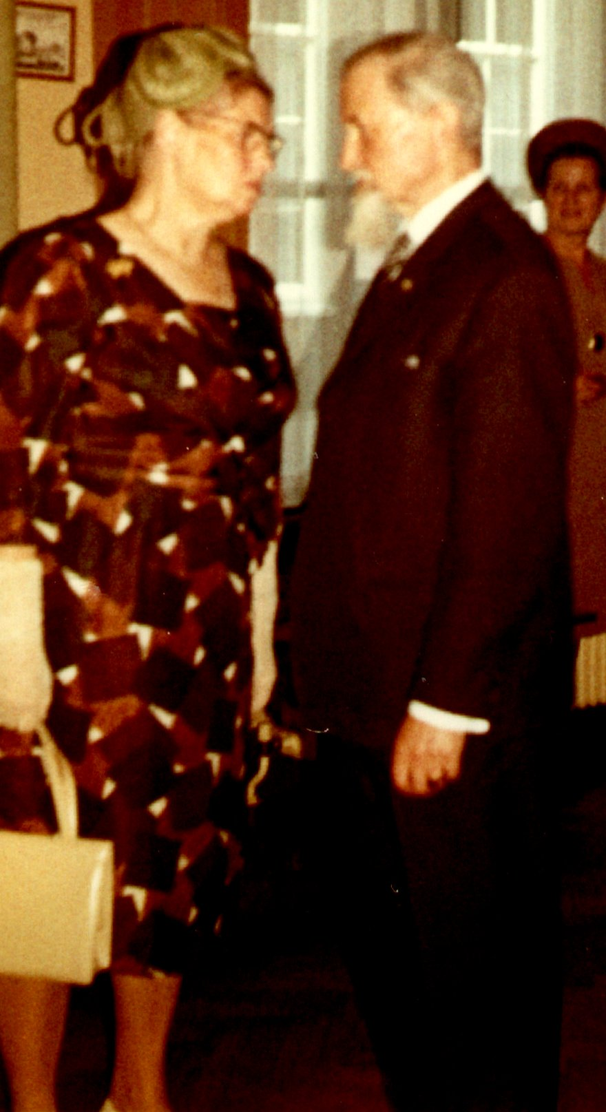 Eigen foto.